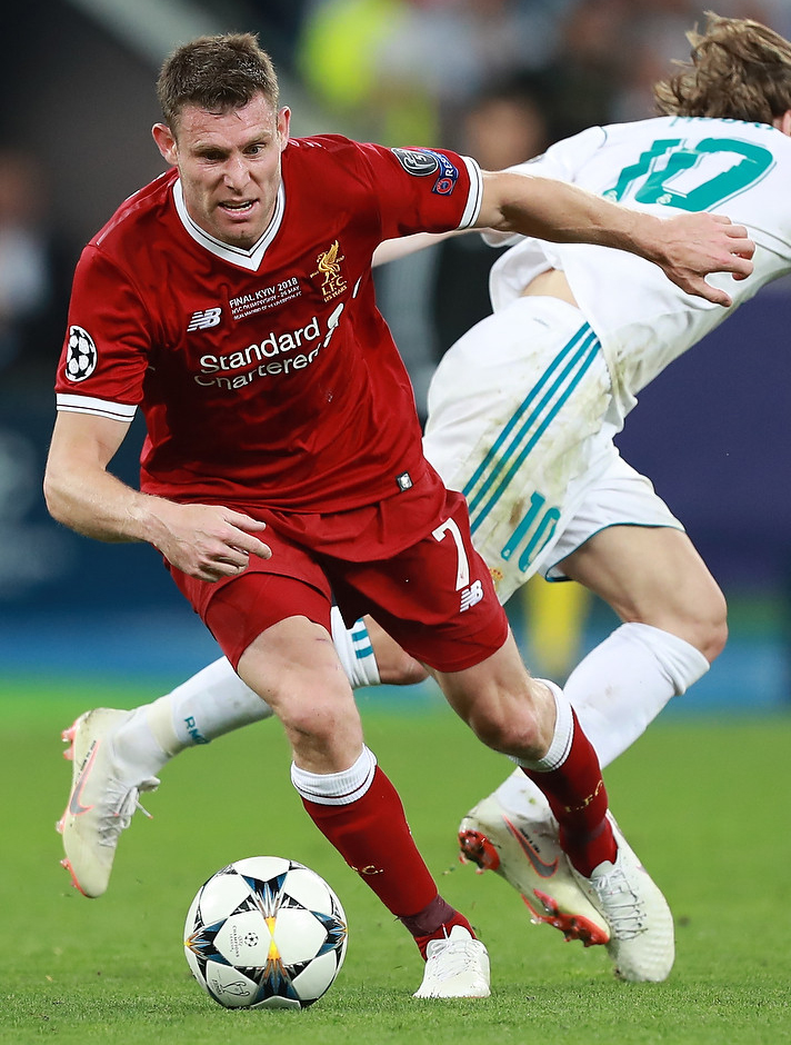 Финал ЛЧ в Киеве: 13-й кубок «Реала» и слёзы «Ливерпуля»